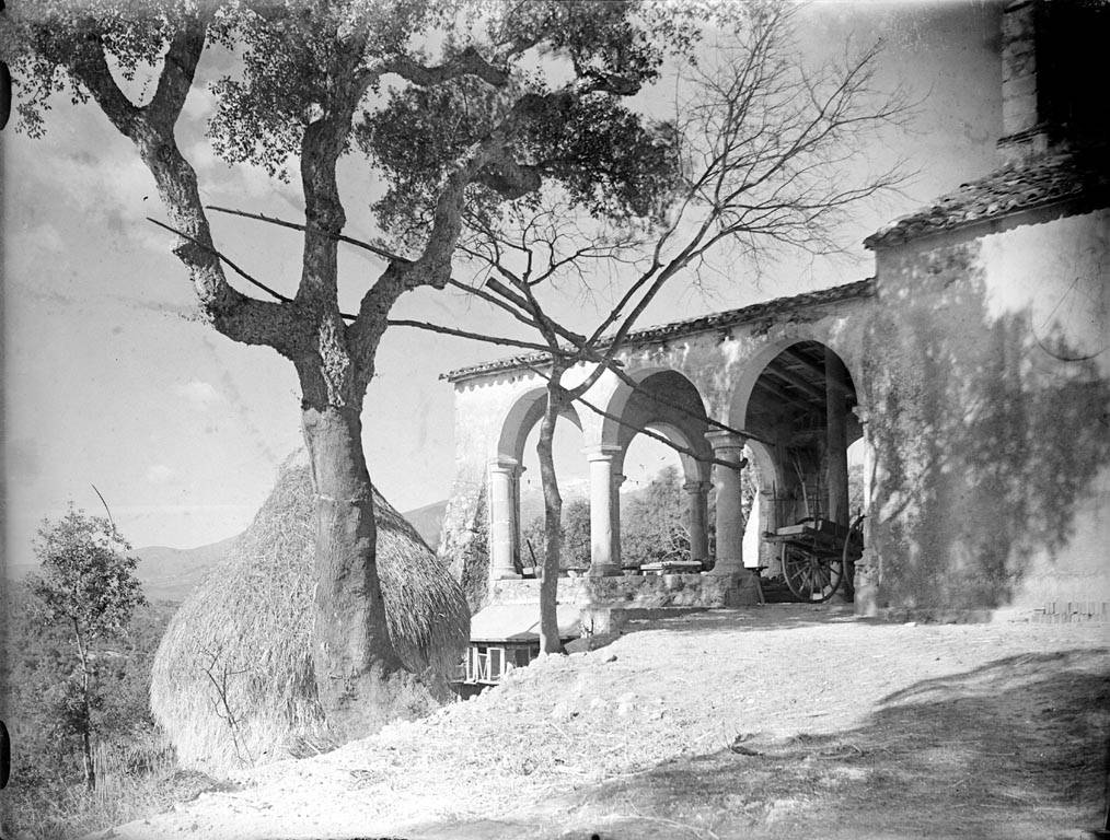 Vista d'una masia amb una arbre, una pila de palla i un carro. Enric Ribas i Virgili (Entre 1920 i 1930)